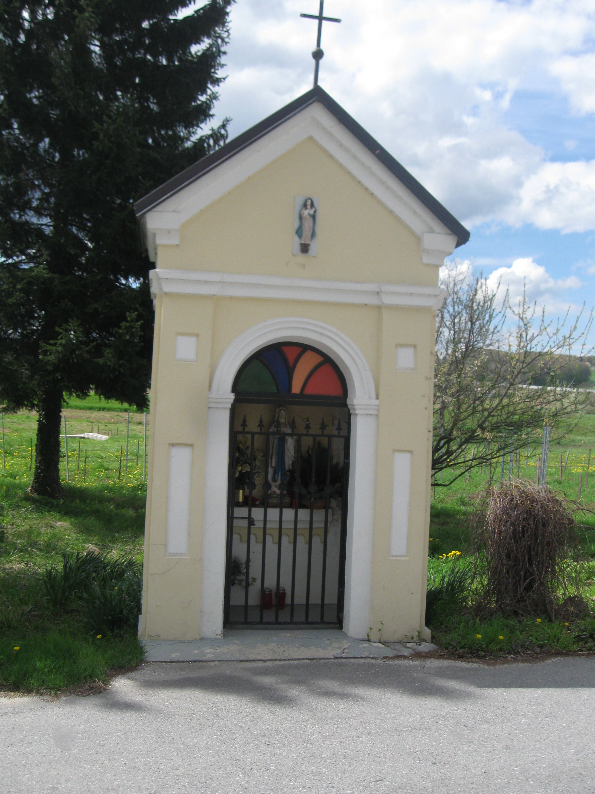 Marijina kapelica iz okoli 1900 ima trikotno čelo in neoklasicistično profilacijo. Zaprta z vrati.